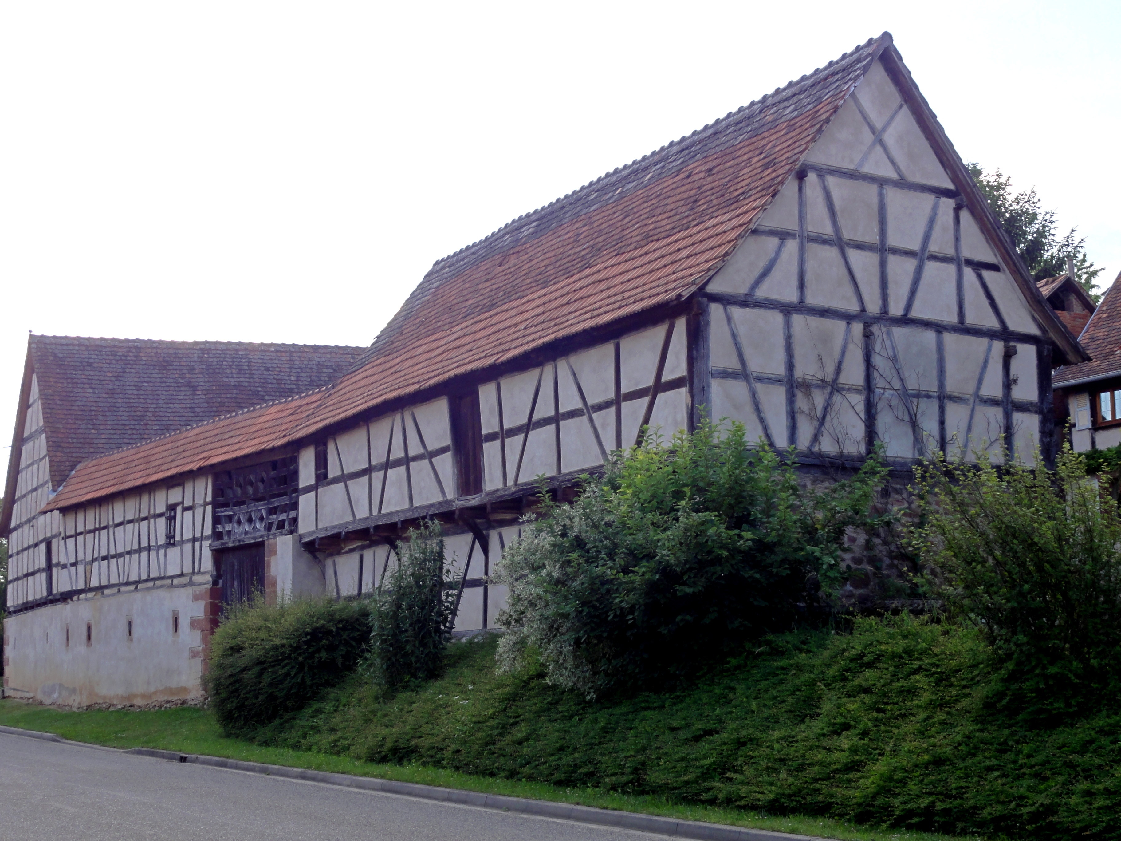 Alsace, Bas-Rhin, Alteckendorf, Ferme (XVIIIe-XIXe), 150 rue Principale. .